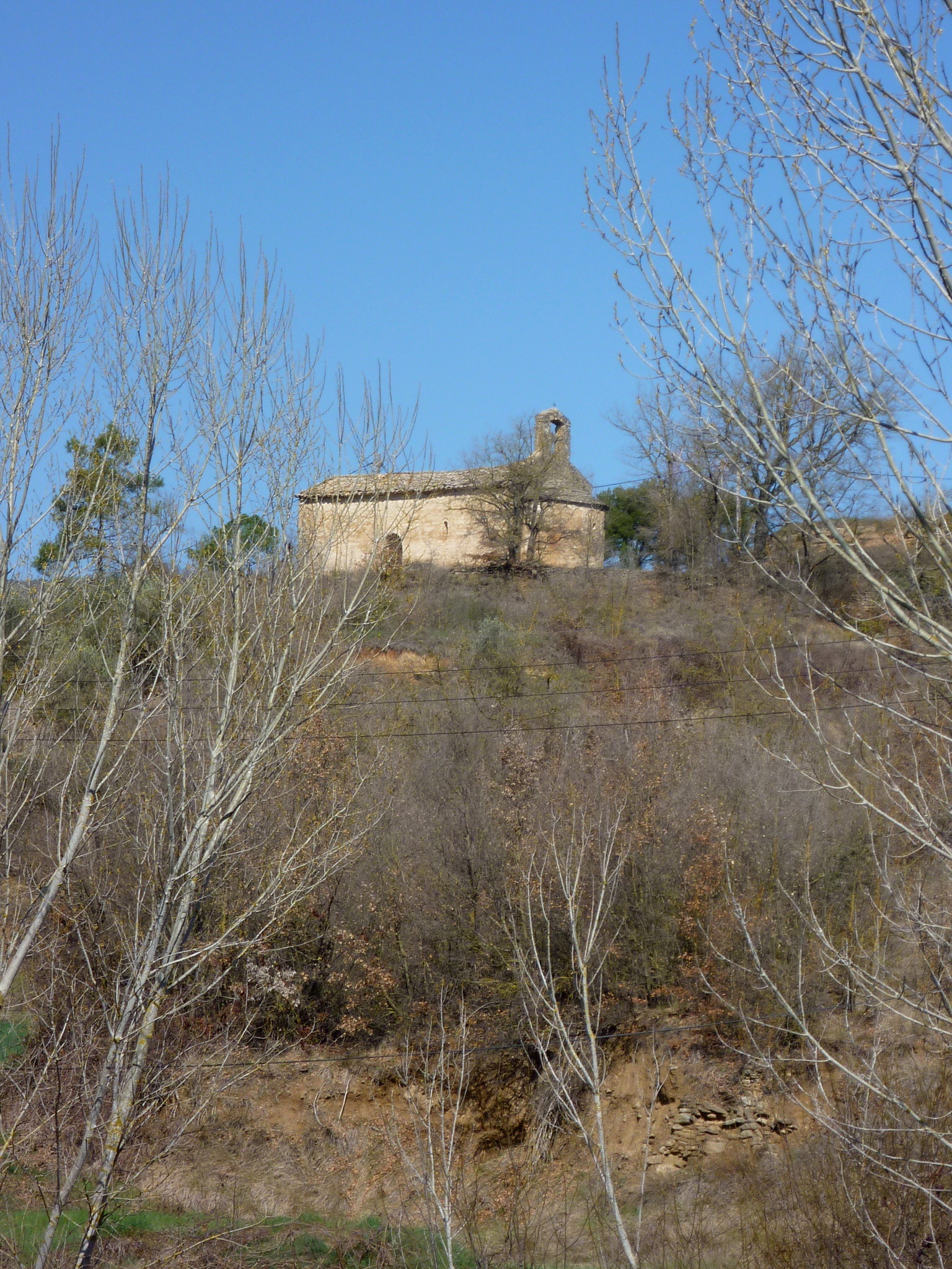 Església de Sant Miquel de Vallmanya (Pinós): des de la carretera